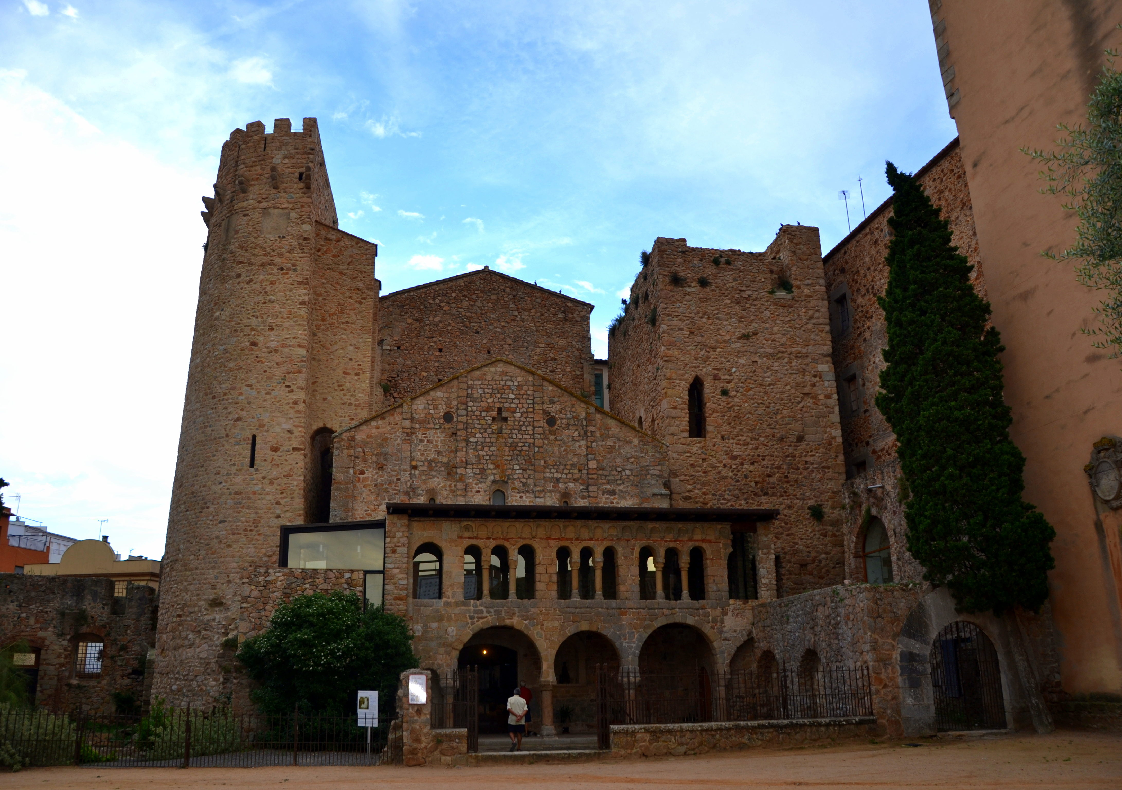 Monestir de Sant Feliu (Sant Feliu de Guíxols)